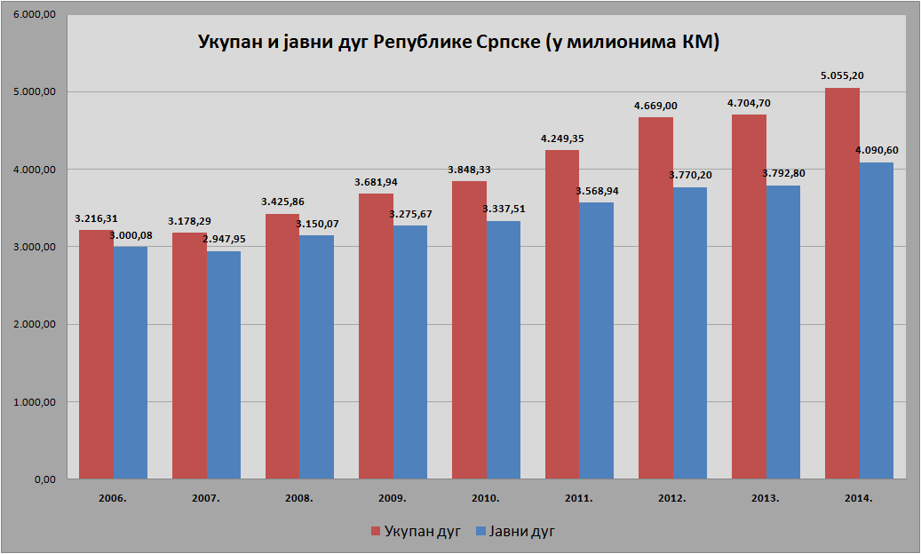 Српски (ћирилица): Укупан и јавни дуг Републике Српске (2006 - 2014) према подацима Министарства финансија Републике Српске